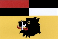 Buzice, vlajka. List tvoří tři vodorovné pruhy, červeno-černě polcený, černo-bíle polcený a žlutý, v poměru 1 : 1 : 3. Ve žlutém pruhu černá kančí hlava s bílou zbrojí a červeným jazykem. Poměr šířky k délce listu je 2 : 3.